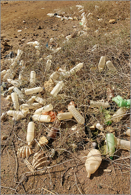 Sinai, Red sea ecological disaster - Nabq nature reserve